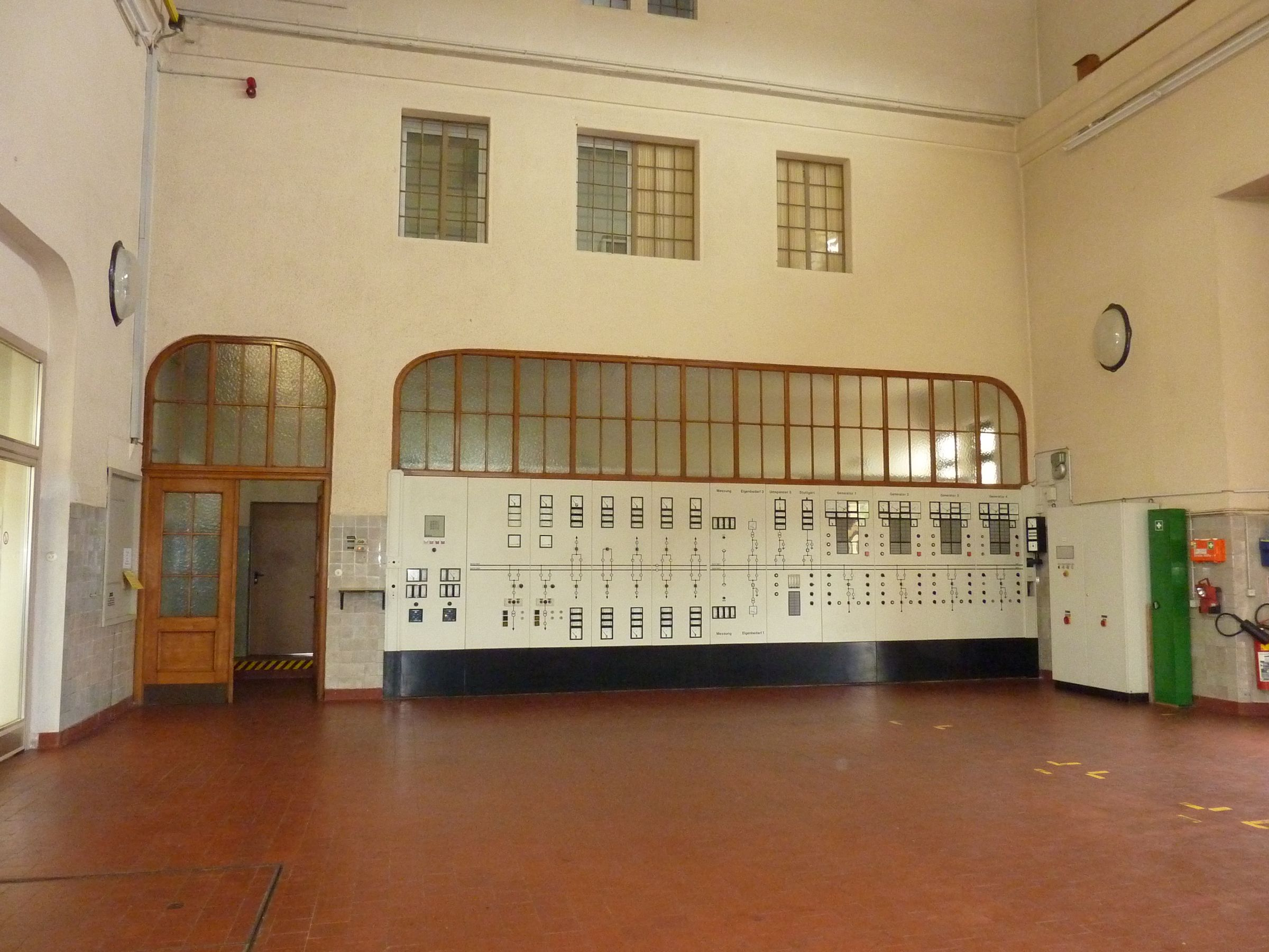 Wasserkraftwerk Pleidelsheim